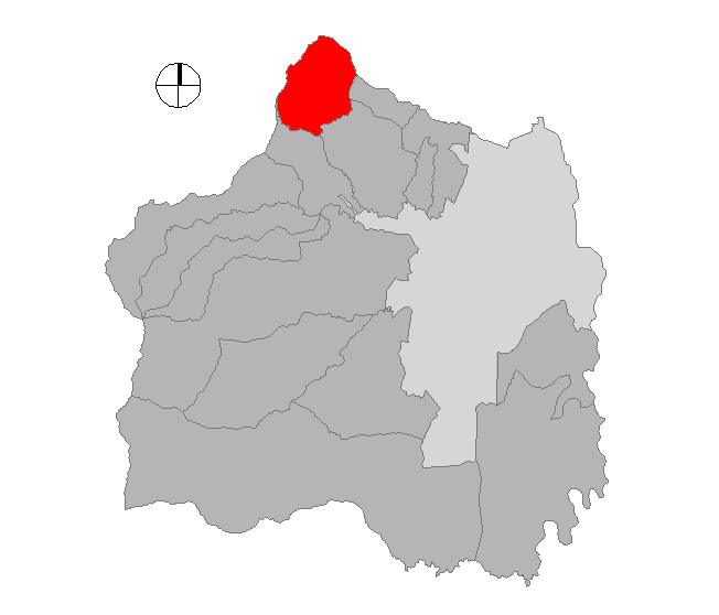 Corregimiento de Cali, Colombia